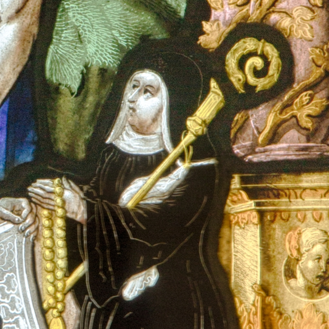 Ausschnitt von